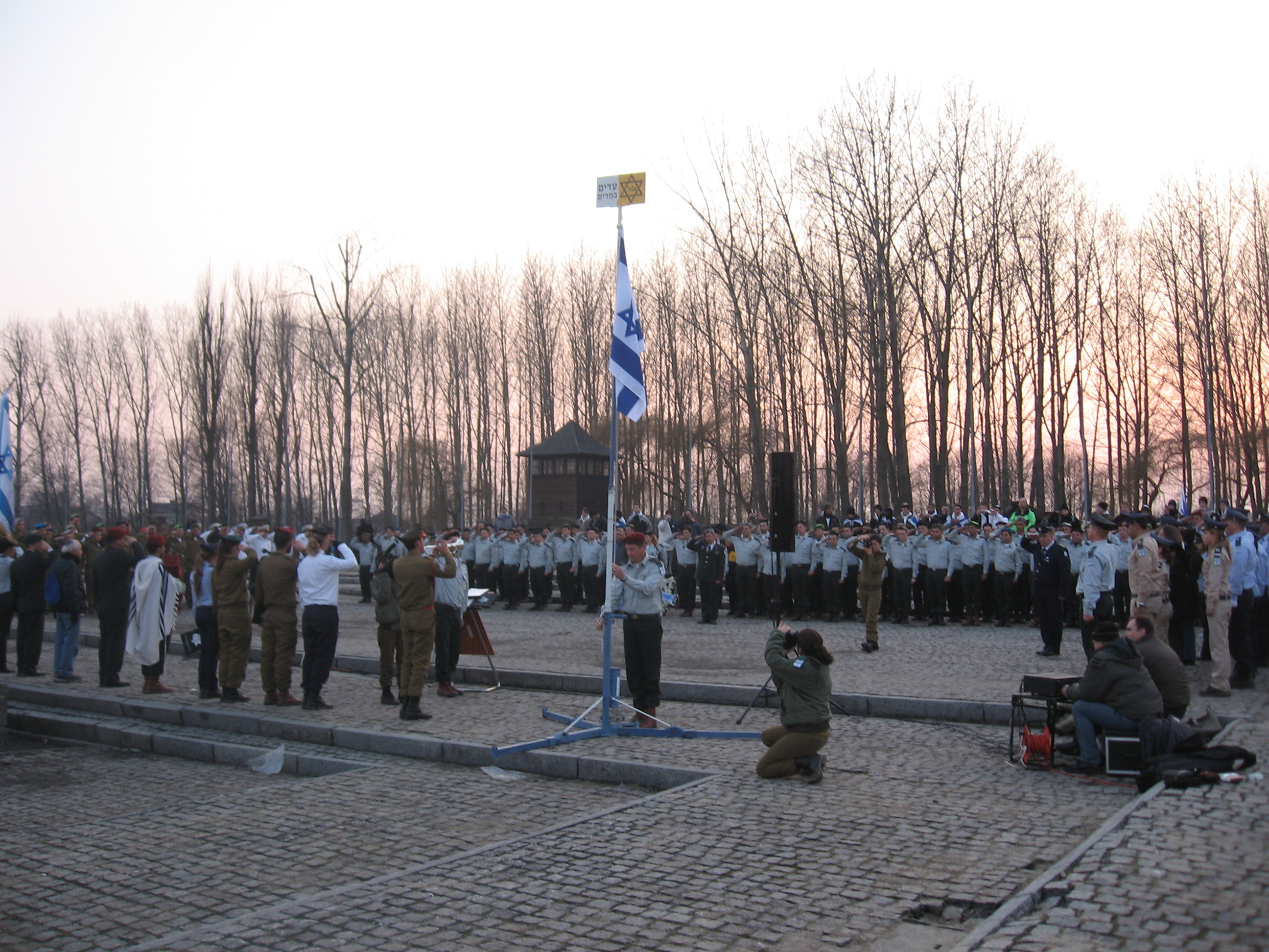 טקס של משלחת צה"ל "עדים במדים" באושוויץ